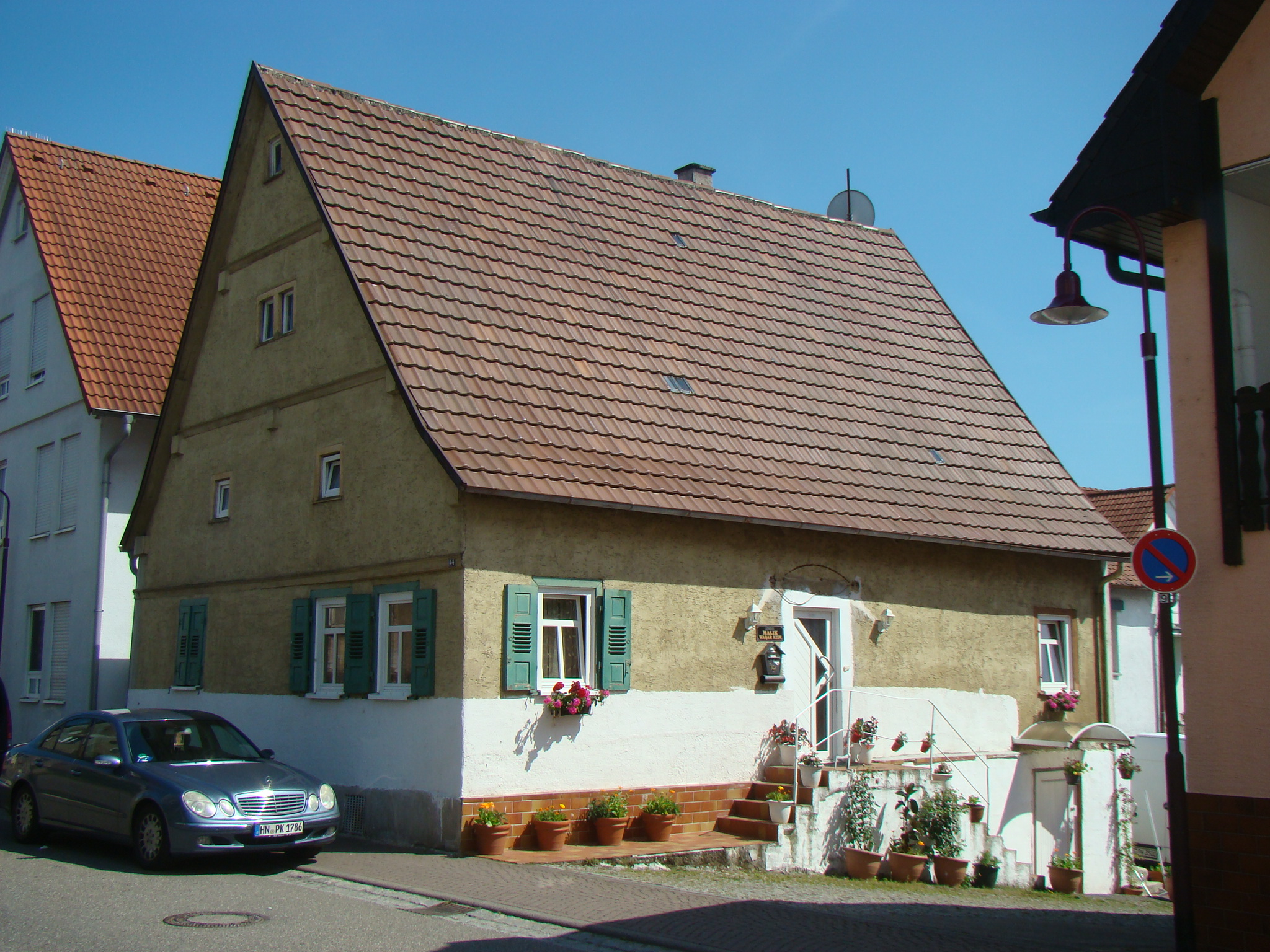 Deutschritterstraße 44 (Heilbronn-Kirchhausen)